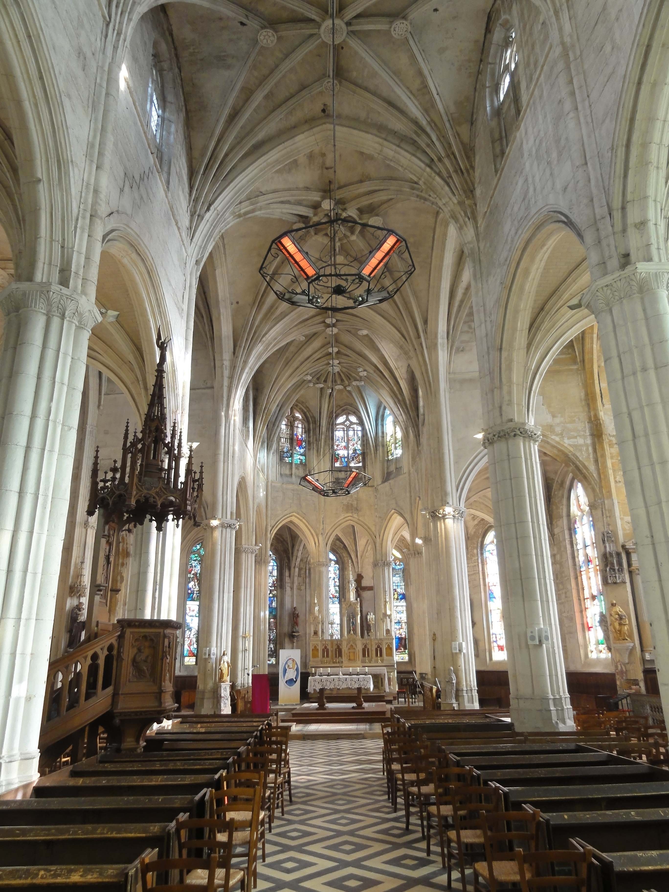 Intérieur de l'église - voir titre.